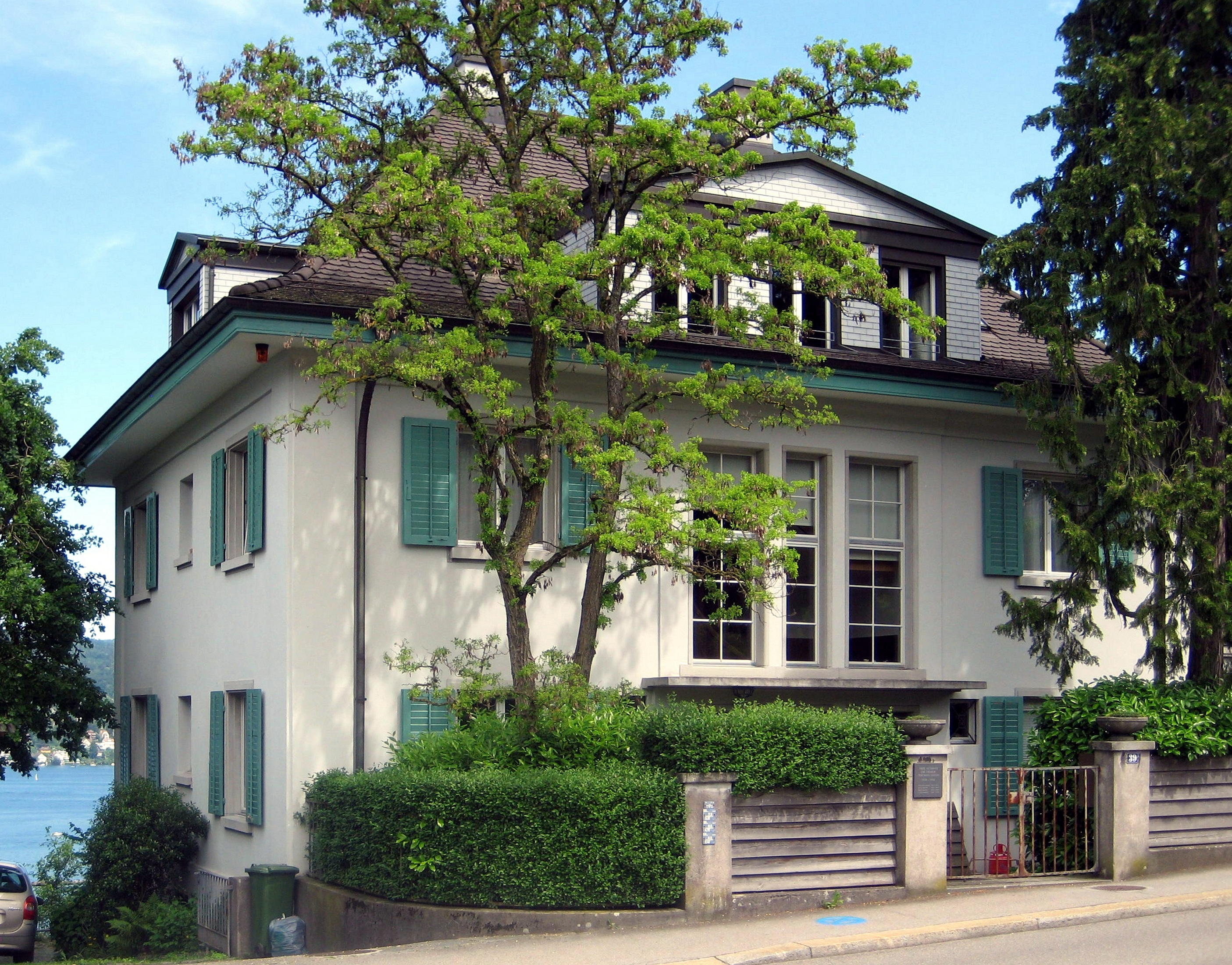 Thomas Manns früheres Haus in Kilchberg, Alte Landstrasse 39, heutiger Zustand